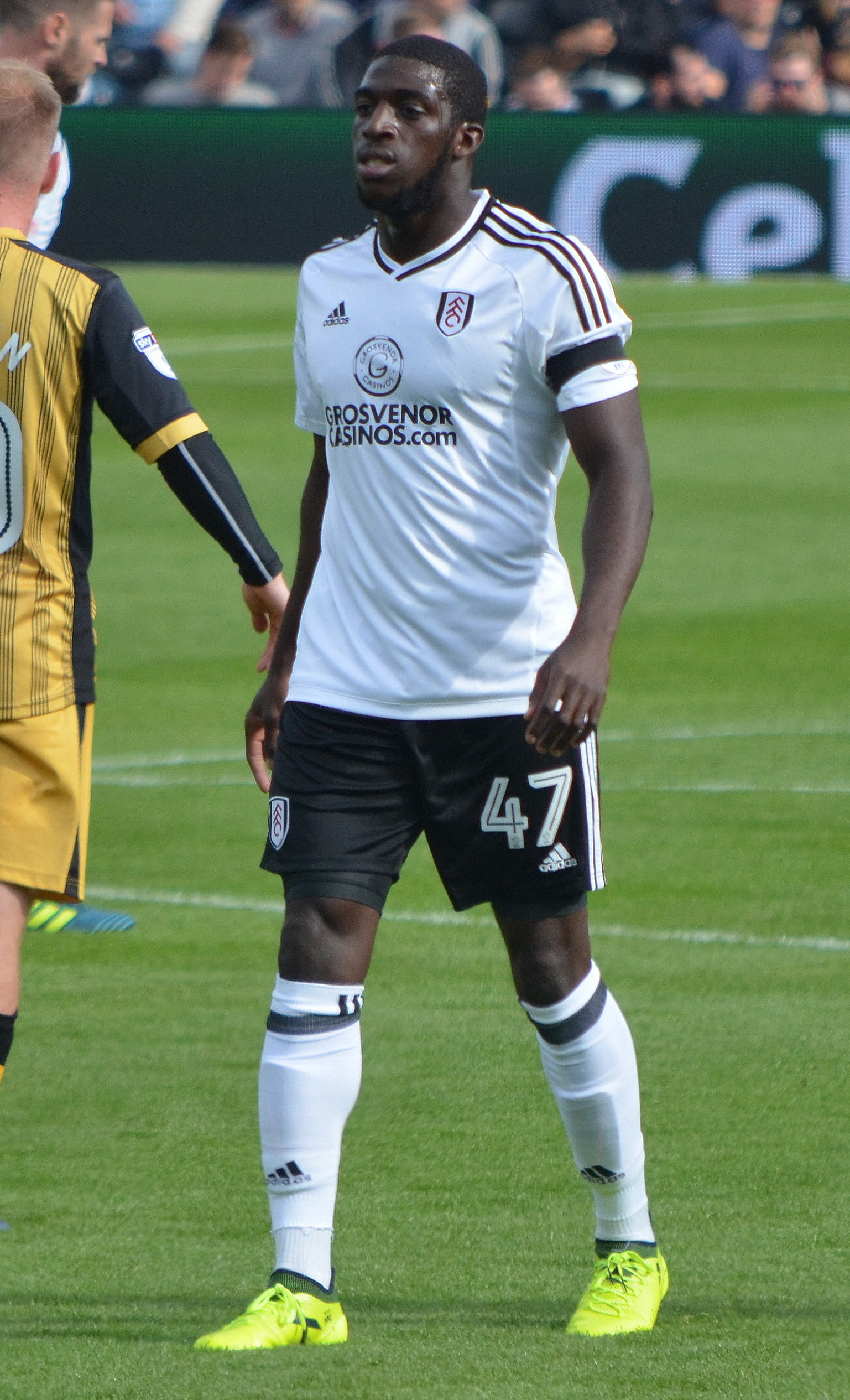 Aboubakar Kamara, Fulham FC